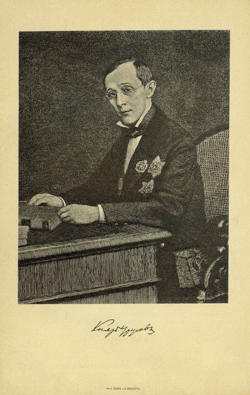 Портрет С. Н. Урусова